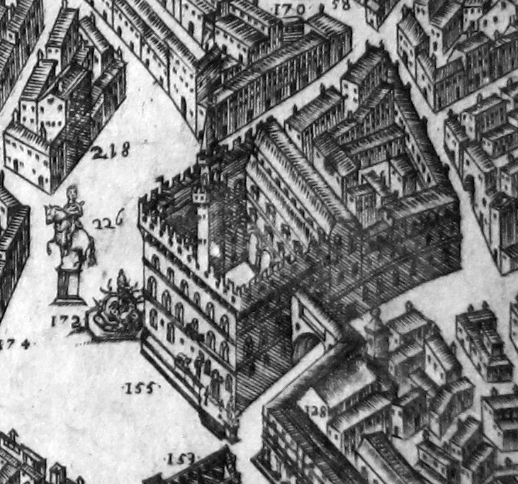 Pianta del buonsignori, dettaglio 155 palazzo del gran duca (palazzo vecchio)